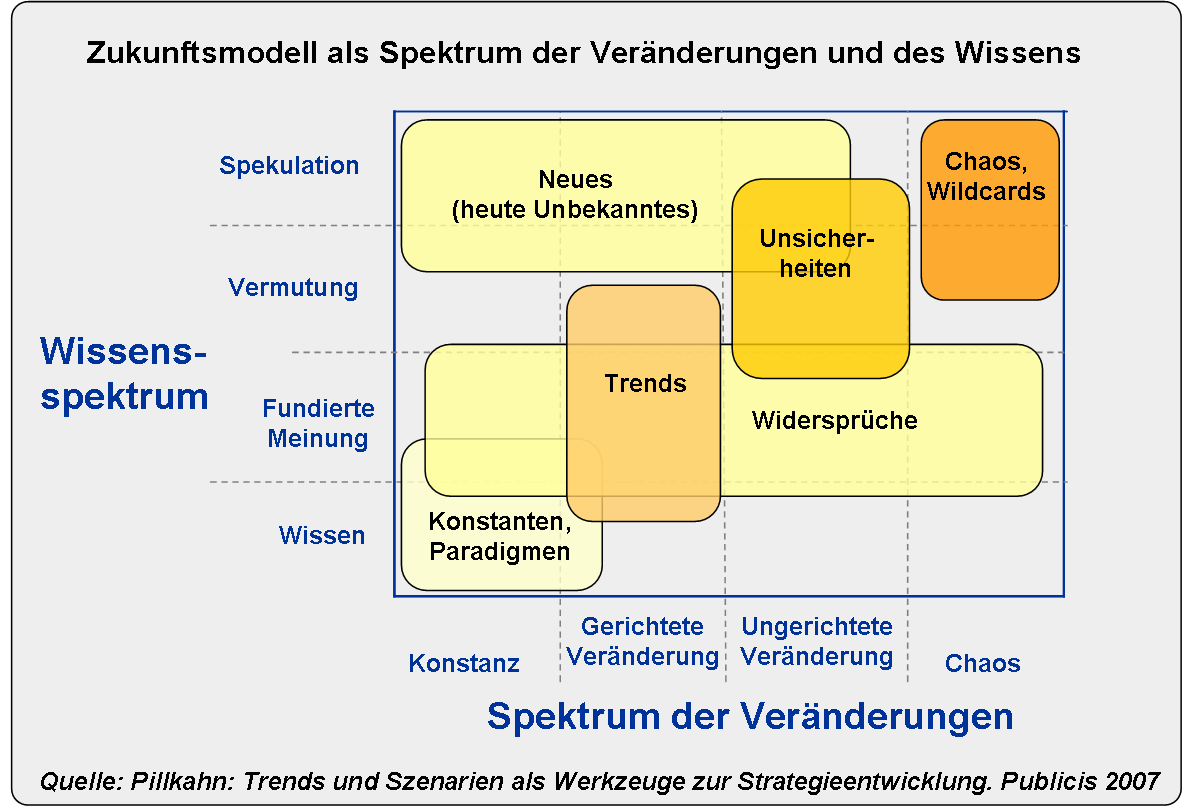 Zukunftsmodell